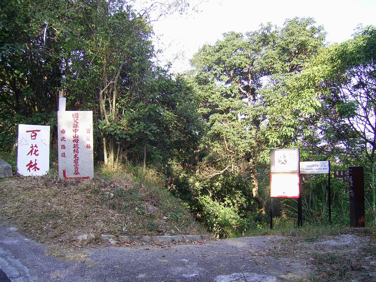 中文（香港）: 百花林